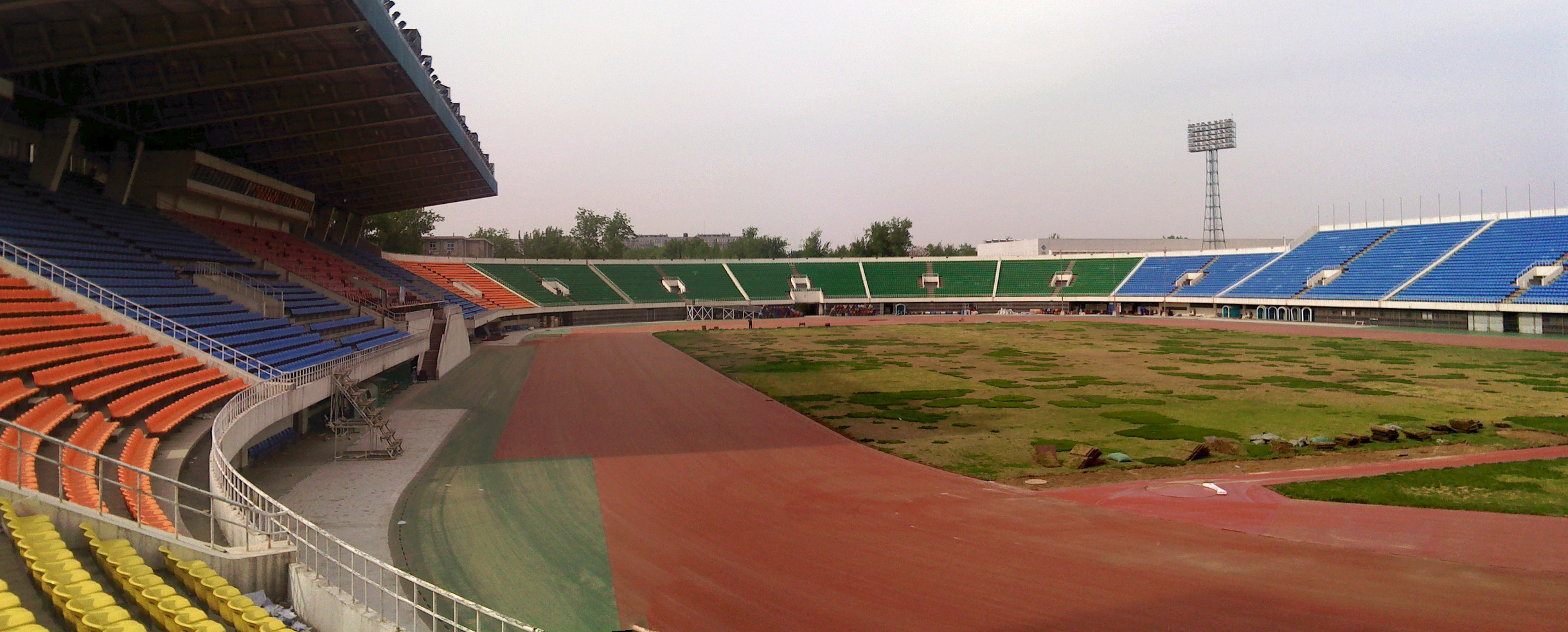 先农坛体育场 - Xiannongtan Stadium - 2011.05